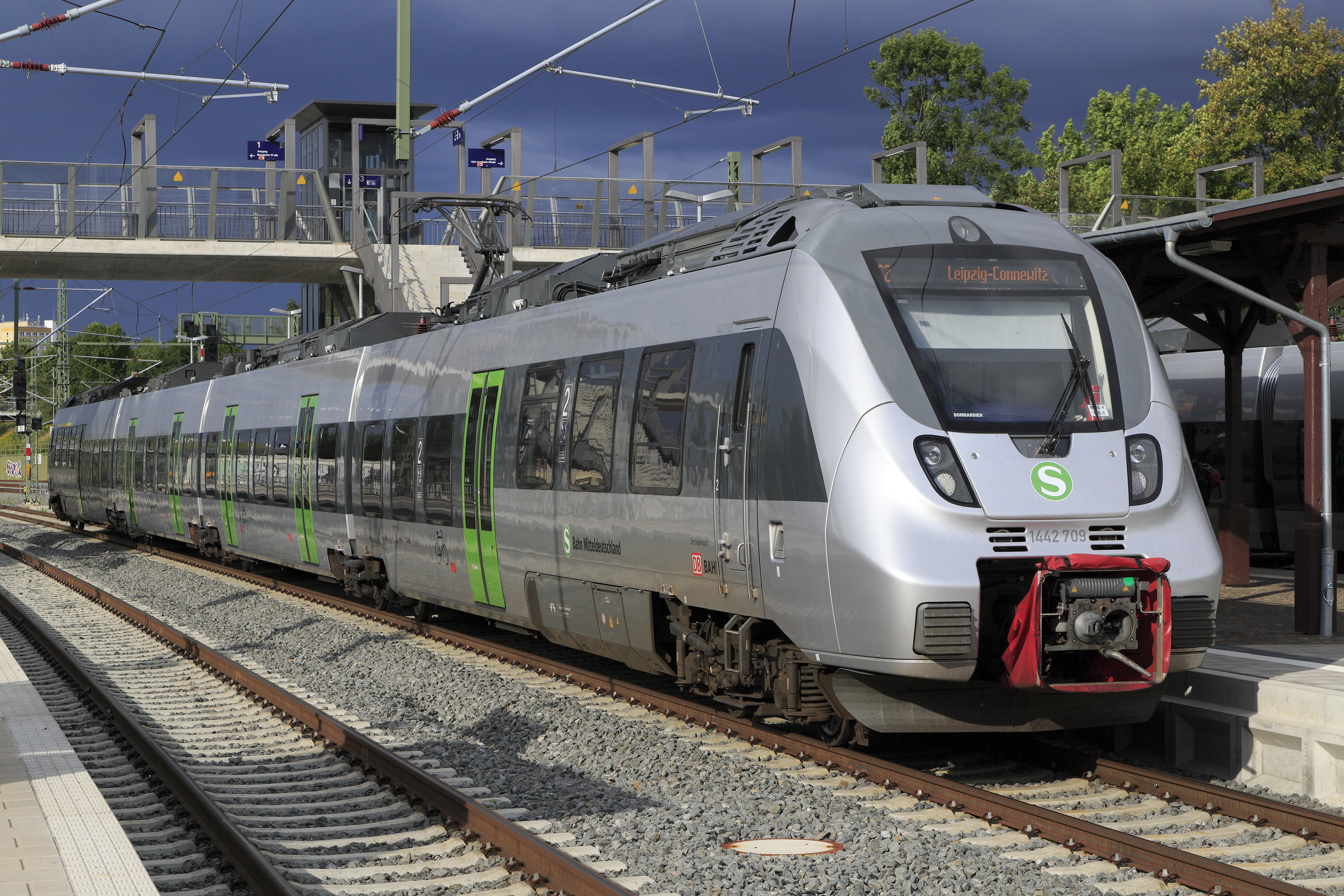 Vierteilige Einheit beim Wendehalt in Connewitz. Die nur im Stundentakt verkehrenden Züge der Linie S2 haben am Wochenende einen an beiden Ende verkürzten Laufweg Connewitz–Delitzsch.